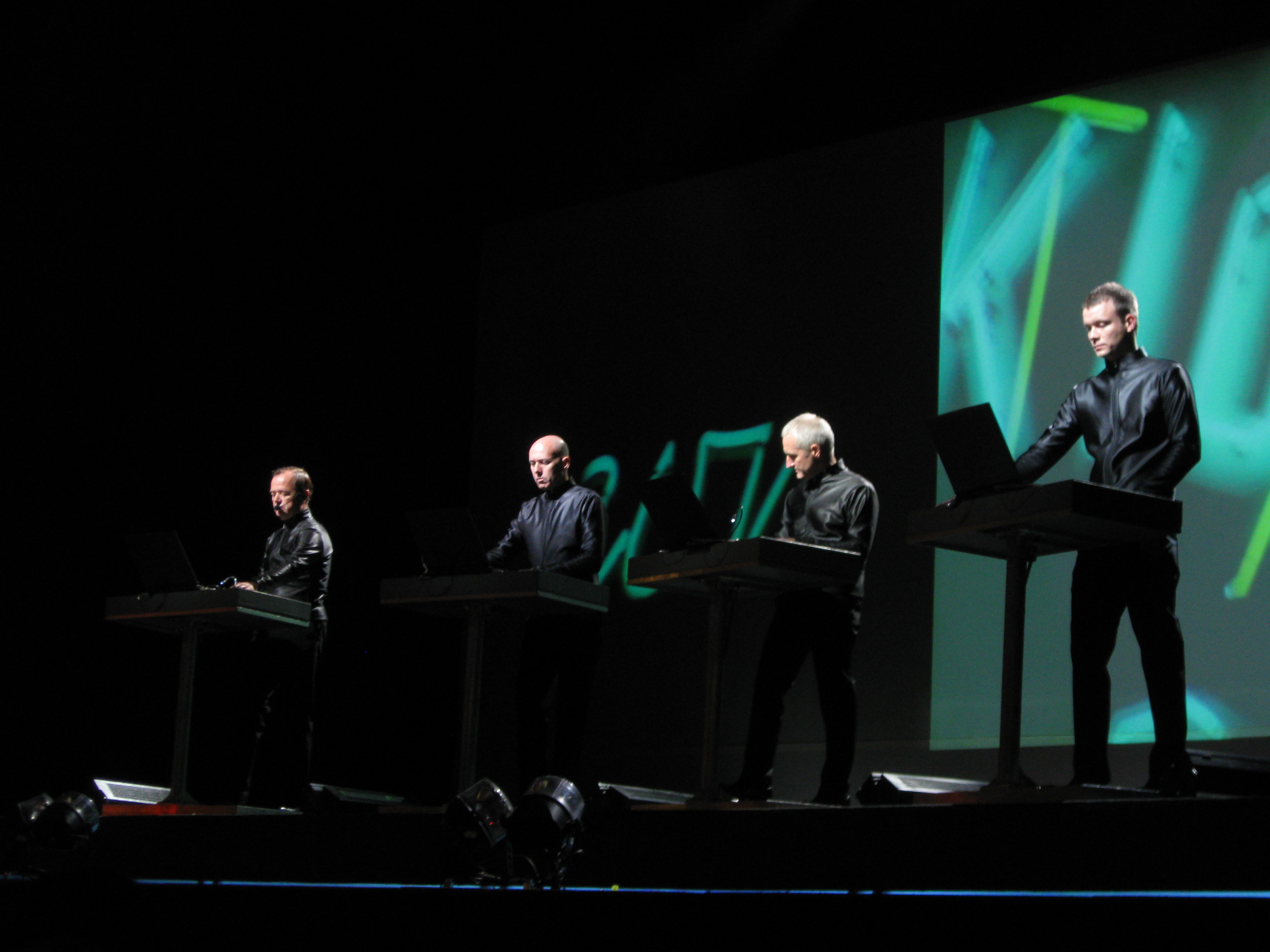 Liveauftritt im Kiew (organisiert durch PinchukArtCentre)